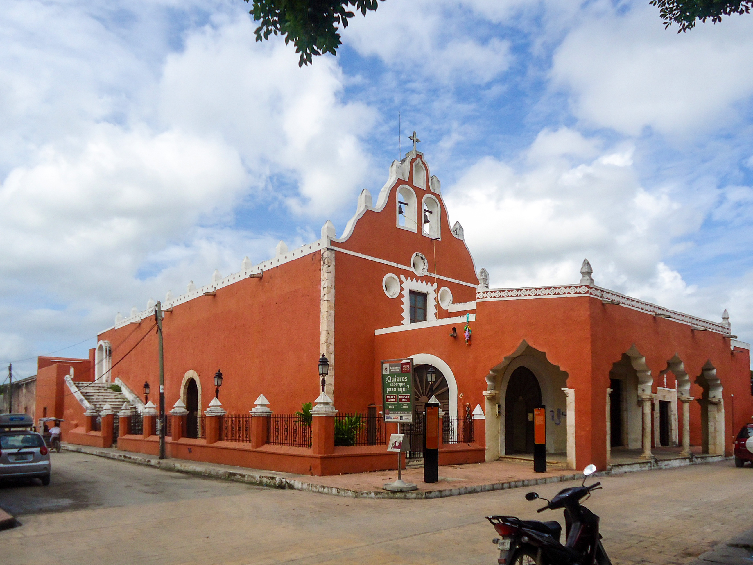 Capilla de la Virgen de la Candelaria, Valladolid Yucatán.